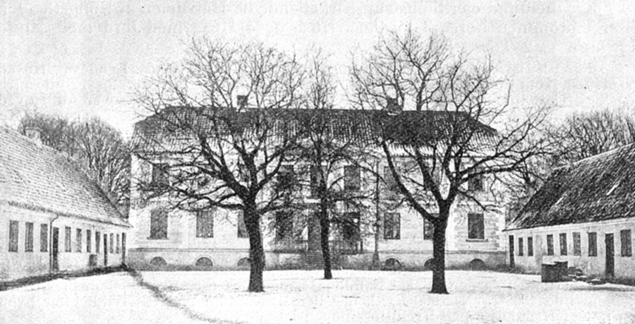 Løjtved Gods, første gang godset omtales, er i 1372; da nævnes Timme af Løjtved af en adelig slægt, som man efter våbnet har kaldt Maanestierne. Løjtved er beliggende ca. 12 km nordvest for Svendborg i Stenstrup Sogn, Sunds Herred, Svendborg Kommune. Hovedbygningen er opført i 1842.